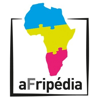 Logo du projet Afripedia (